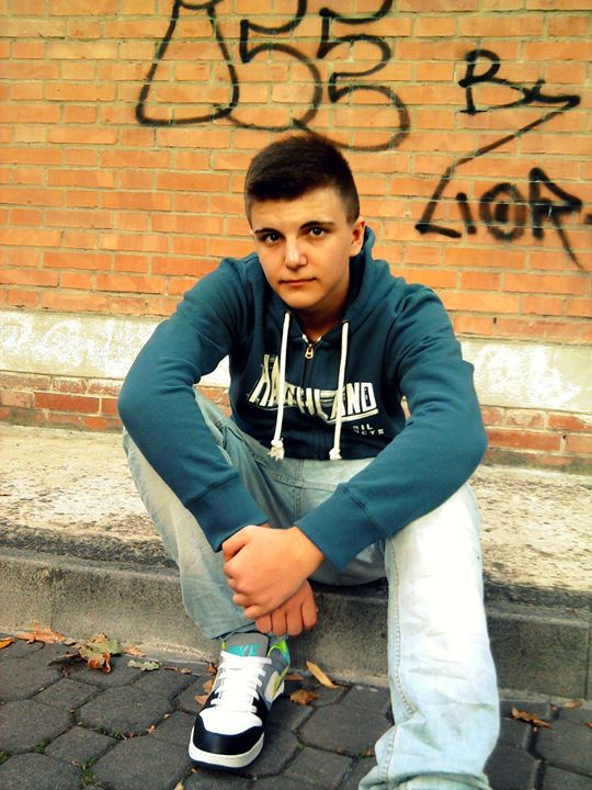 Gegë: ilir mitu